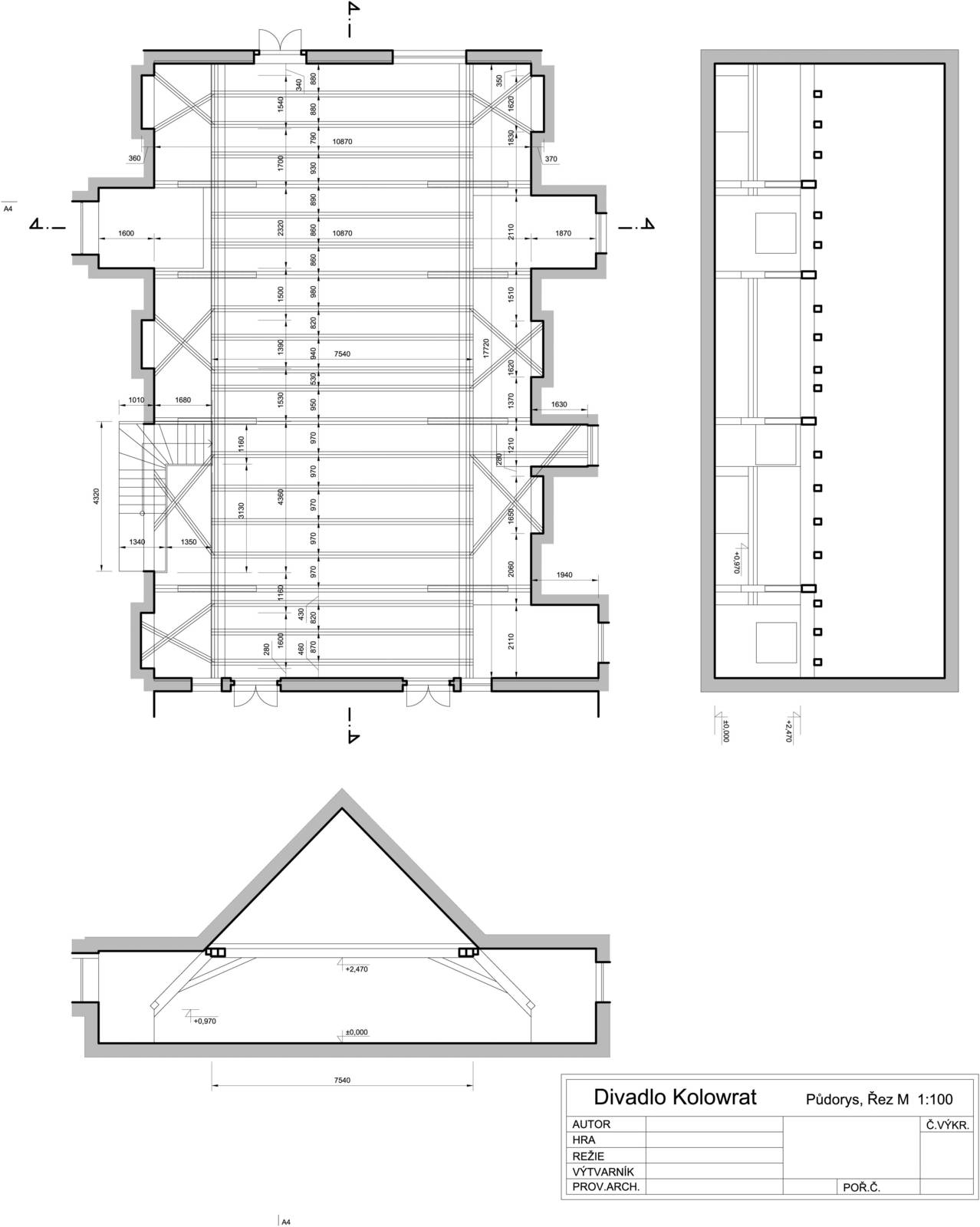 Plánek půdorysu Divadla Kolowrat